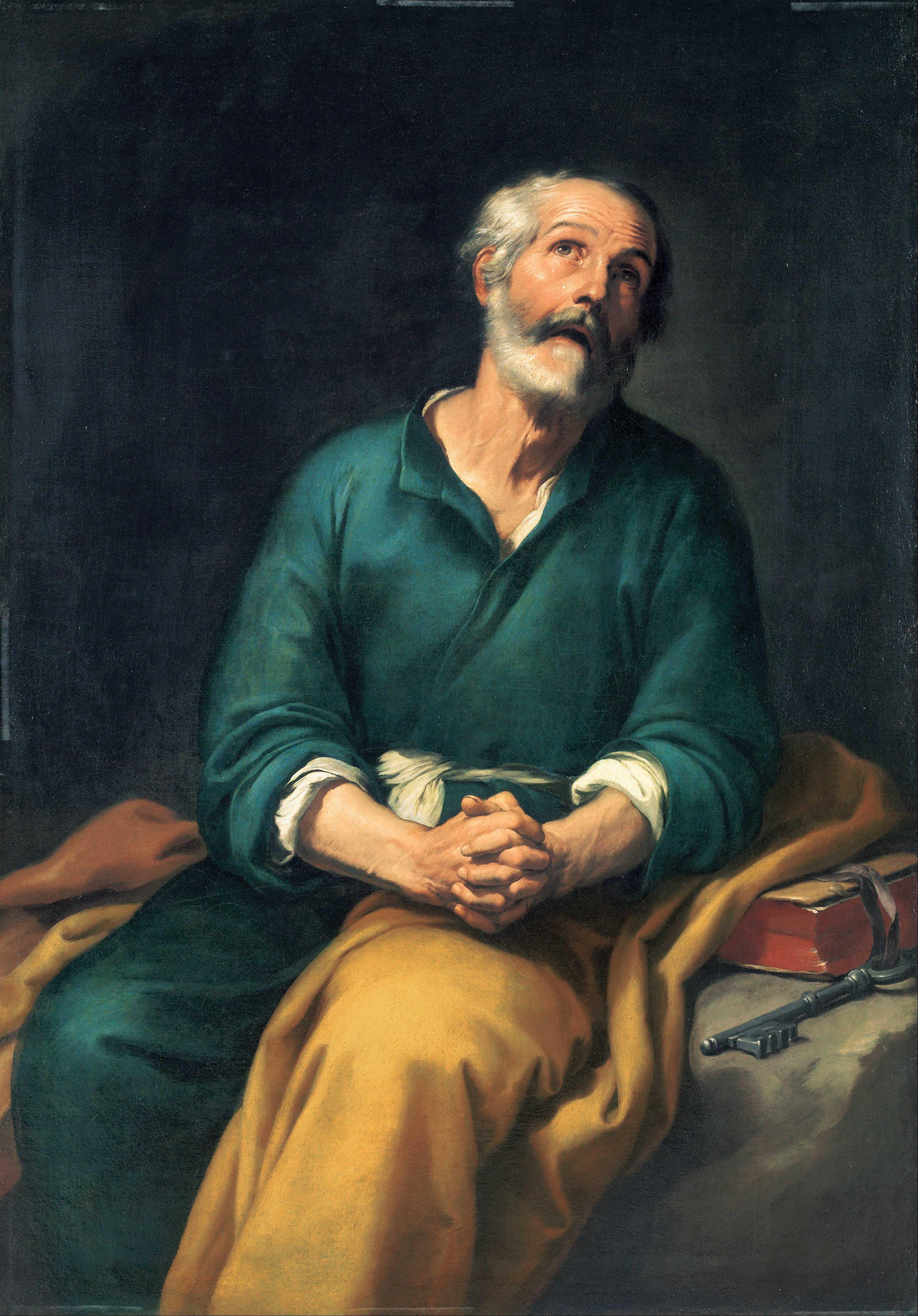 El lienzo representa a San Pedro Apostol, primer papa de la Iglesia Católica y crucificado según la tradición en Roma durante el reinado del emperador Nerón. El apóstol aparece llorando por haber negado a Jesucristo tres veces en la noche anterior a la crucifixión de su maestro.